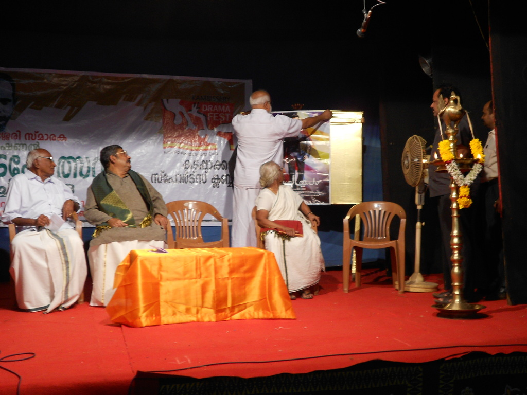 വിശ്വരൂപം സിനിമ നിരോധനത്തിനെതിരെ സിനിമ പോസ്റ്റർ പതിച്ച് സി.പി.ഐ.എം പോളിറ്റ് ബ്യൂറോ അംഗം എം.എ. ബേബി ഐക്യദാർഡ്യം പ്രഖ്യാപിക്കുന്നു